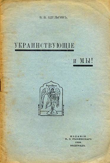 Обложка книги "Украинствующие и мы"